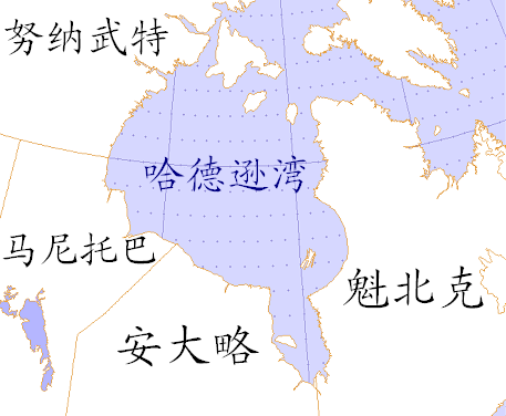 哈德逊湾地图（简体）